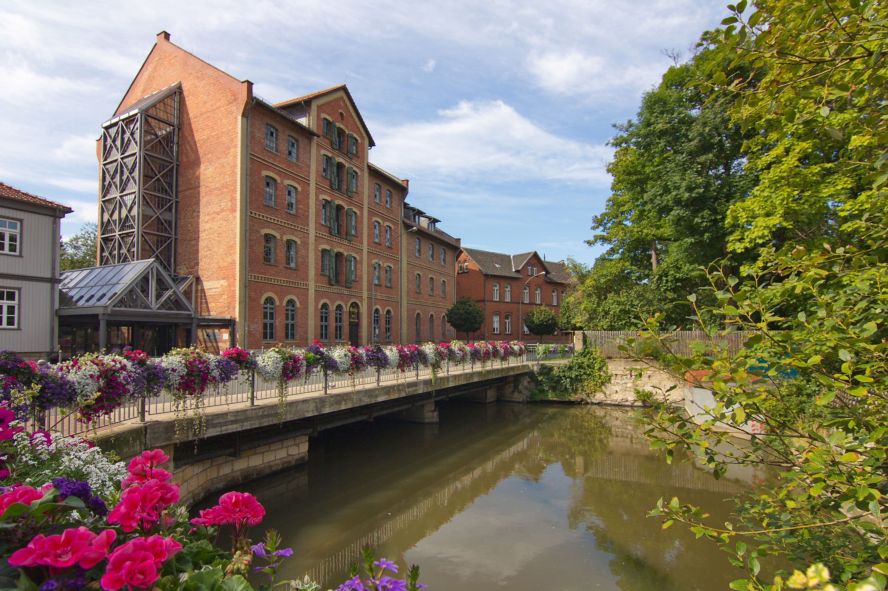 Schünemanns Wassermühle von 1630 in Wolfenbüttel war bis 1979 in Betrieb, seitdem nutzt das aufwendig restaurierte Gebäude die "Bundesanstalt für kulturelle Bildung".